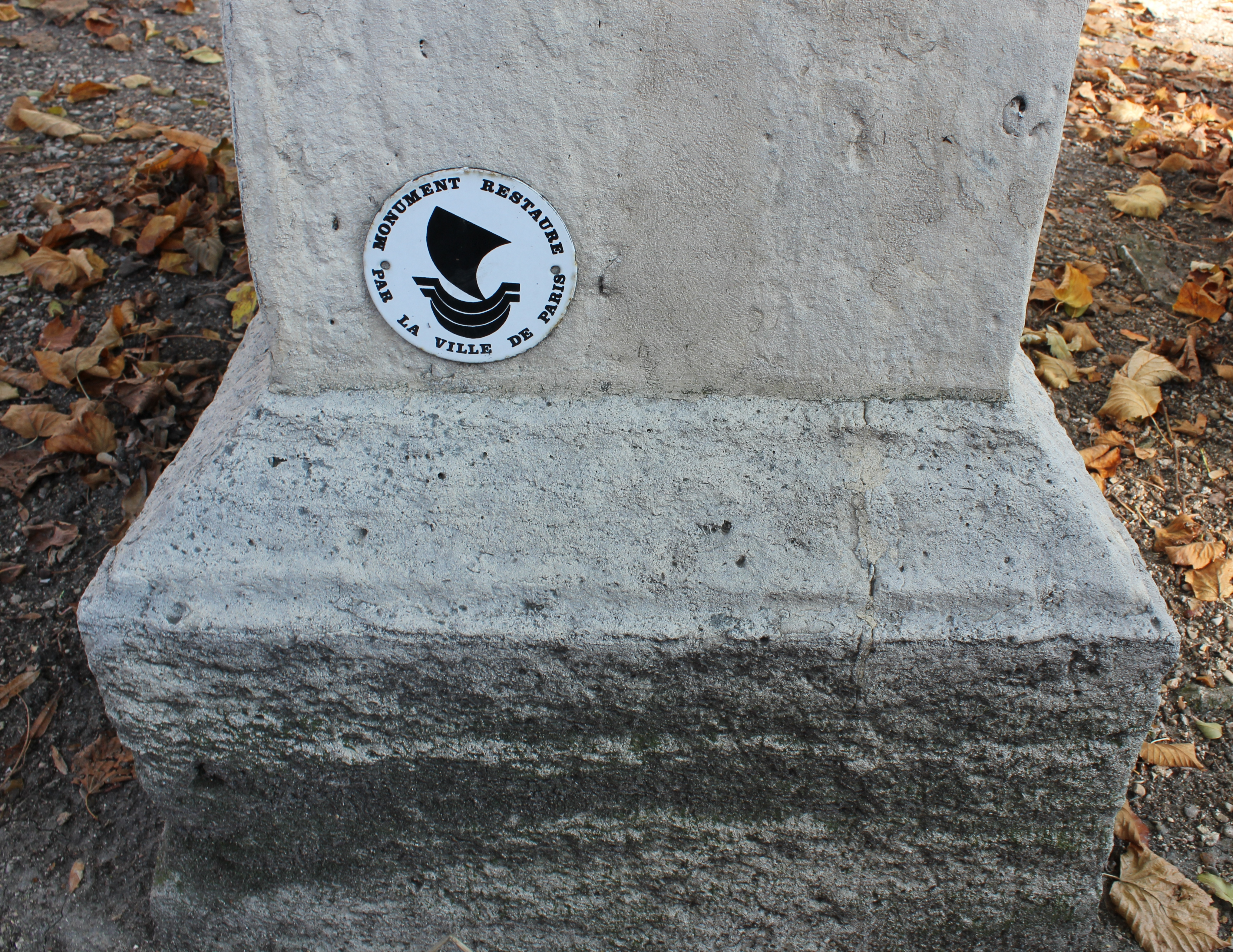 Cénotaphe d'Antoine de Guillaume-Lagrange (1781-1807), dite tombe du Dragon. Monument élevé par sa mère, à la mémoire de son fils, dragon, mort en Pologne. Stèle ornée au recto d'un médaillon représentant le Antoine de Guillaume-Lagrange, d'un sabre et d'une carabine sculptés ainsi qu'une allégorie de la douleur. Au verso figure une épitaphe. Il s'agit de la première sculpture du cimetière. détail, côté droit